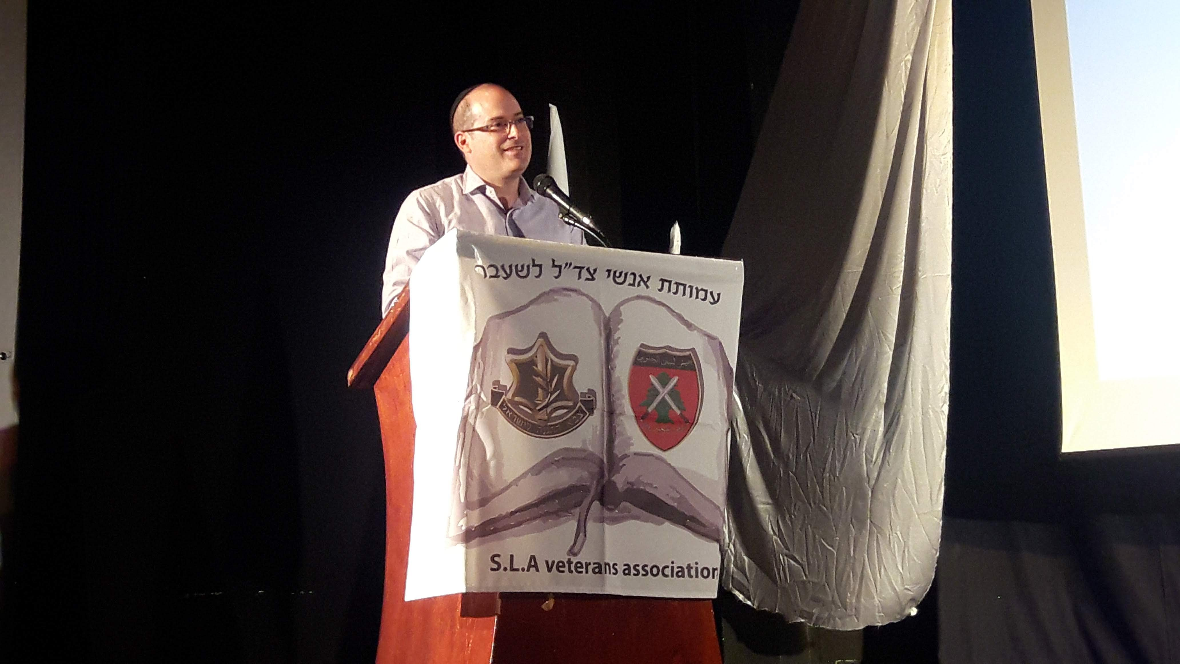 נואם בכנס צד"ל בנהריה